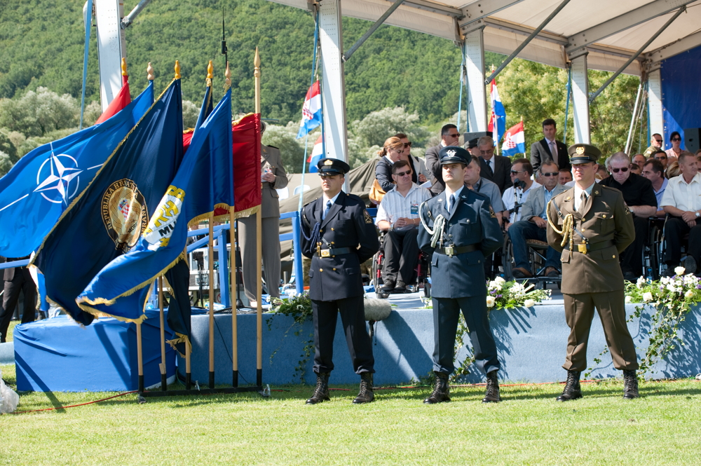 16. obljetnica vojnoredarstvene operacije Oluja u Kninu